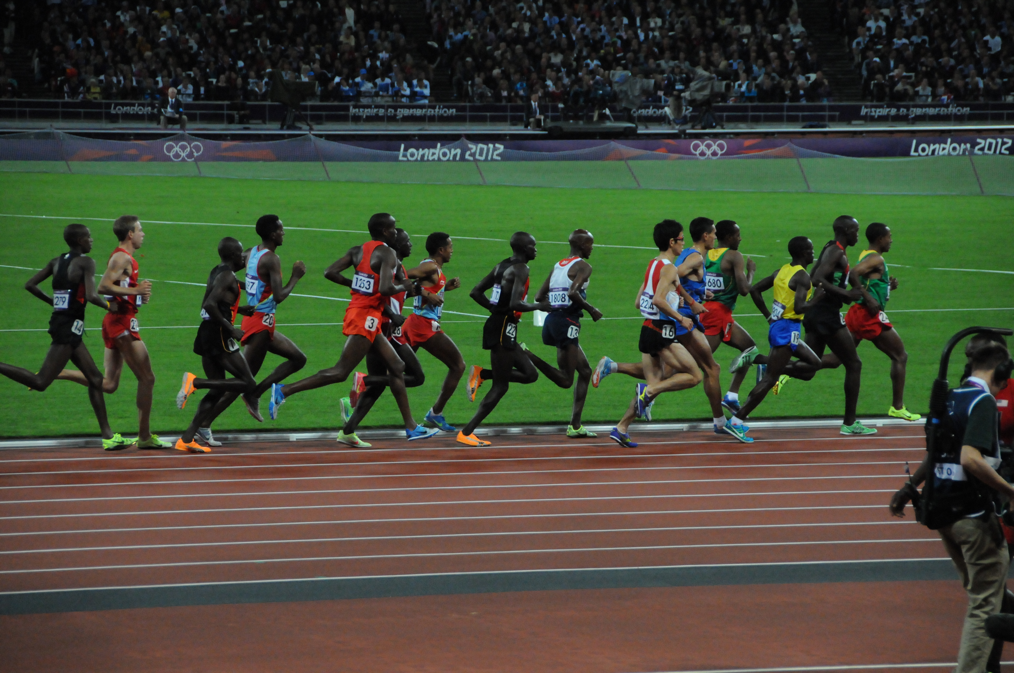 Course du 10000m aux JO Londres